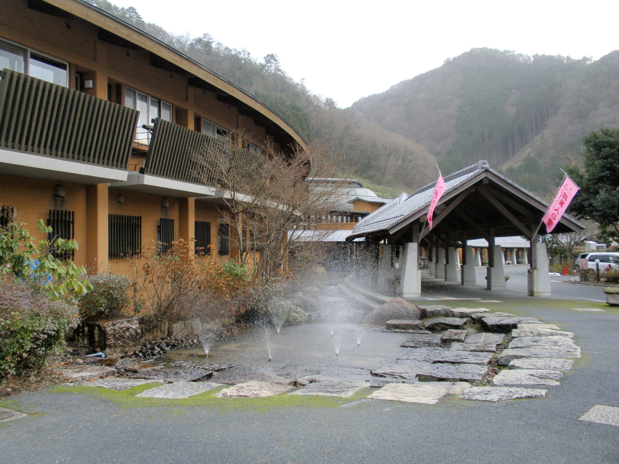 奥津温泉 花美人の里